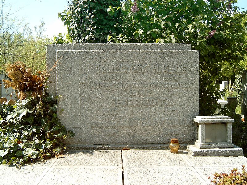 Olgyay Miklós (Letenye, 1904. máj. 15. – Bp., 1958. nov. 29.): növénypatológus, mikológus, egyetemi tanár sírja Budapesten. Új köztemető: 7/7-1-123/124.